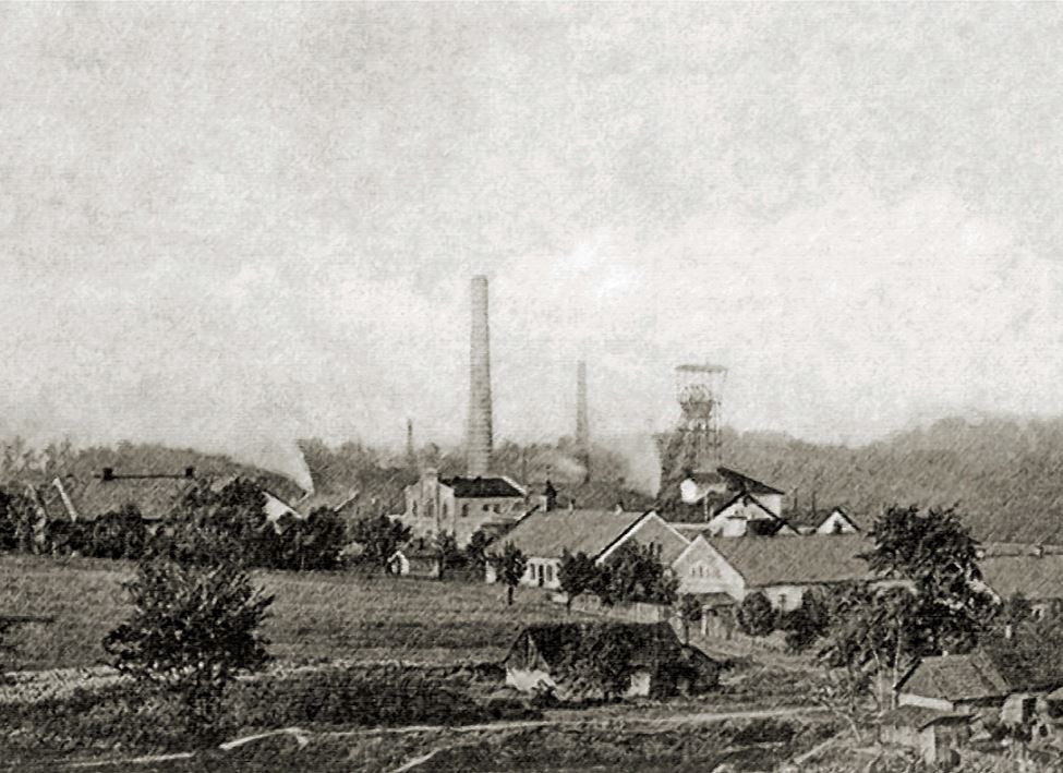 Michálka